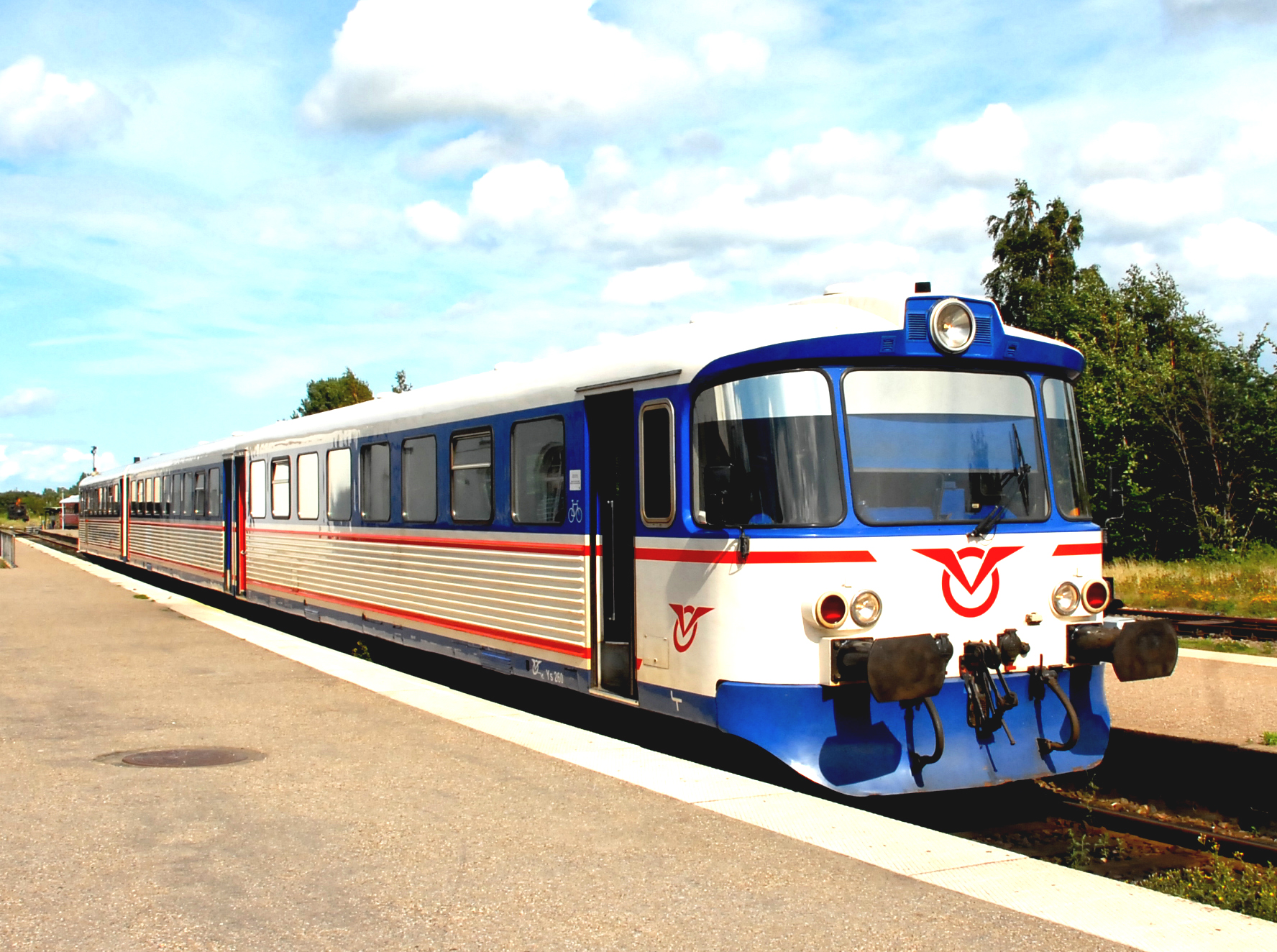 Vestsjællands Lokalbaner treinstel van het type Lynette betaande uit Ys 259, Yp .. en Ym 59 (ex Skagensbanen Ym 1, Yp .. en Ys 11. ex Nordjyske Jernbaner Ym 1, Yp .. en Ys 11) te Nykøbing Sj.